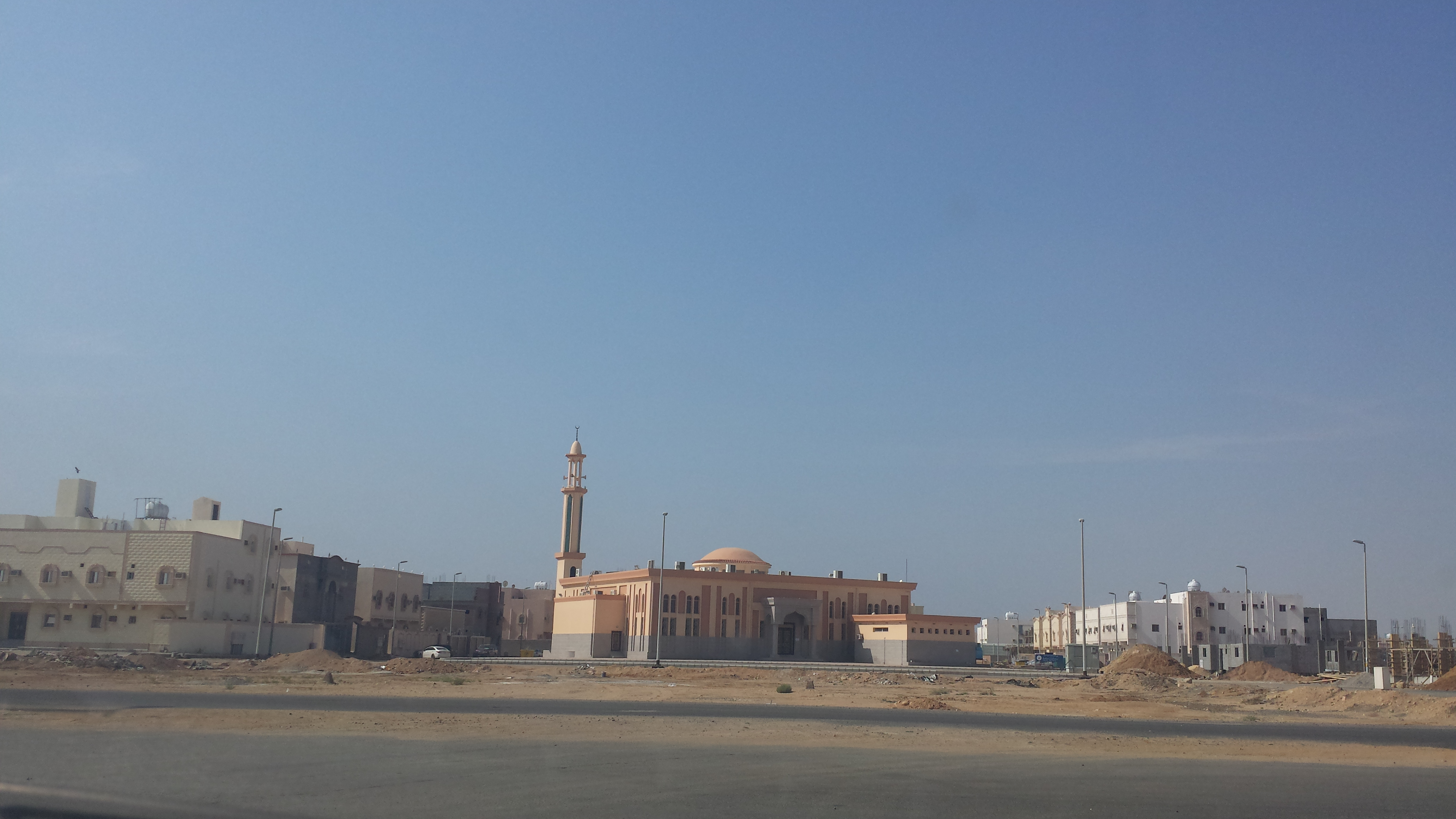 Attakhi, Yanbu Saudi Arabia